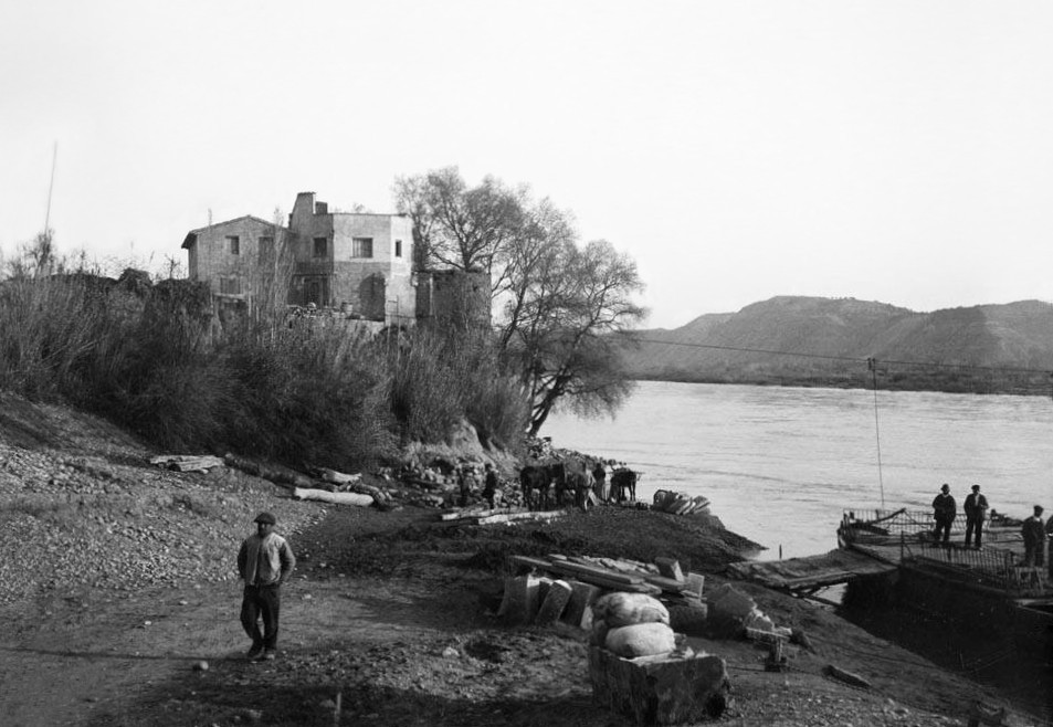 Imatge